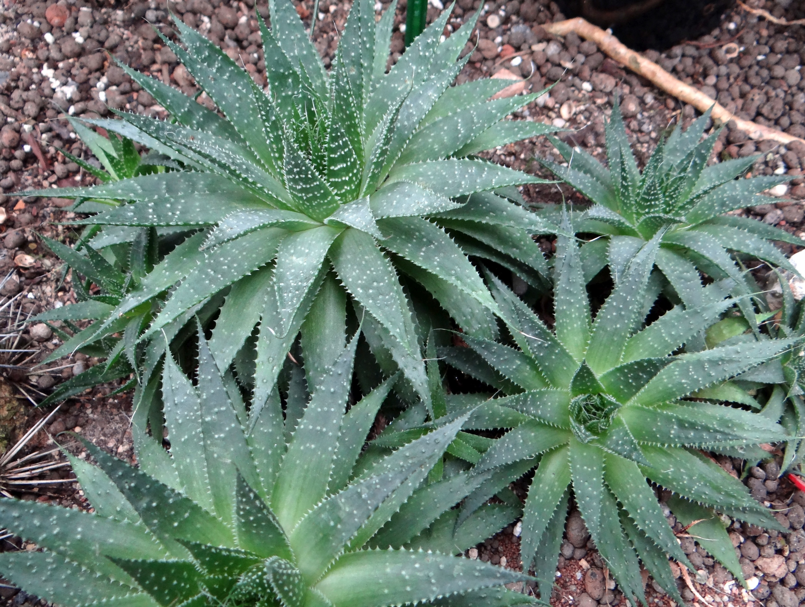 Aristaloe aristata. Location: Poland, Botanical Garden, Łódź